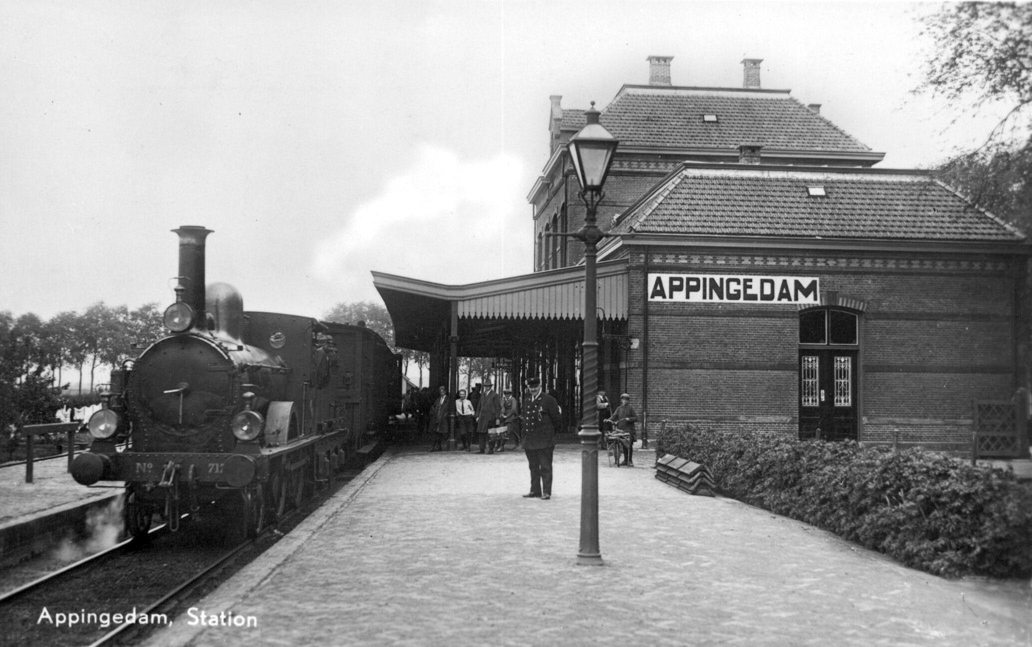 Stoomtrein van de NS met loc 717 (serie 700) in het station Appingedam; circa 1920. Collectie van het Utrechts Archief.